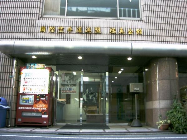 “Kyokushin-Kaikan_Tokyo_headquarters”Japan